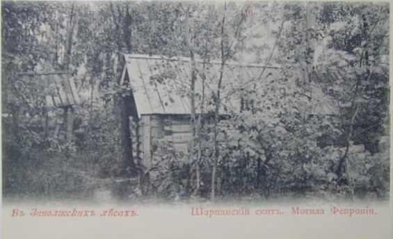 Grave of Fevroniya in Sharpan (Могила матери Февронии в Шарпанском скиту)